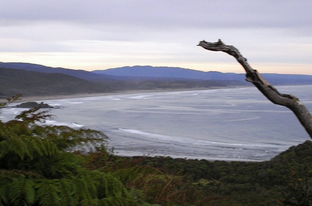 Sector norte de la Bahía de Cucao, en la costa occidental de la Isla Grande de Chiloé